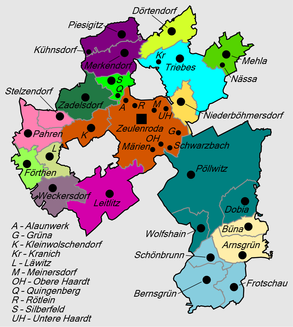 Gliederung der Stadt Zeulenroda-Triebes ab 1. April 1992